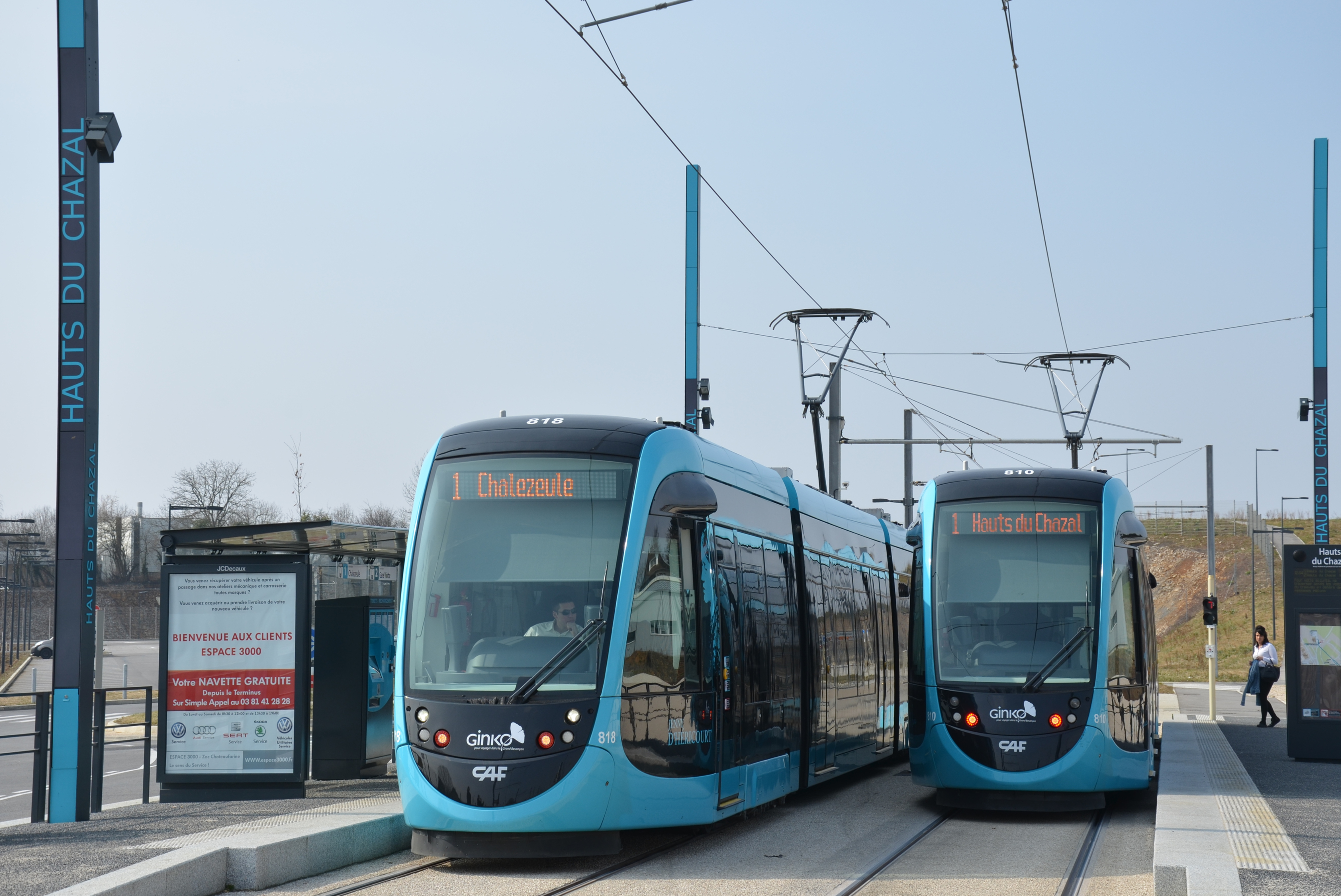 Rames CAF Urbos 3 n°818 et 810 à quai au terminus des lignes 1 et 2 du réseau GINKO de Besançon, Hauts du Chazal.